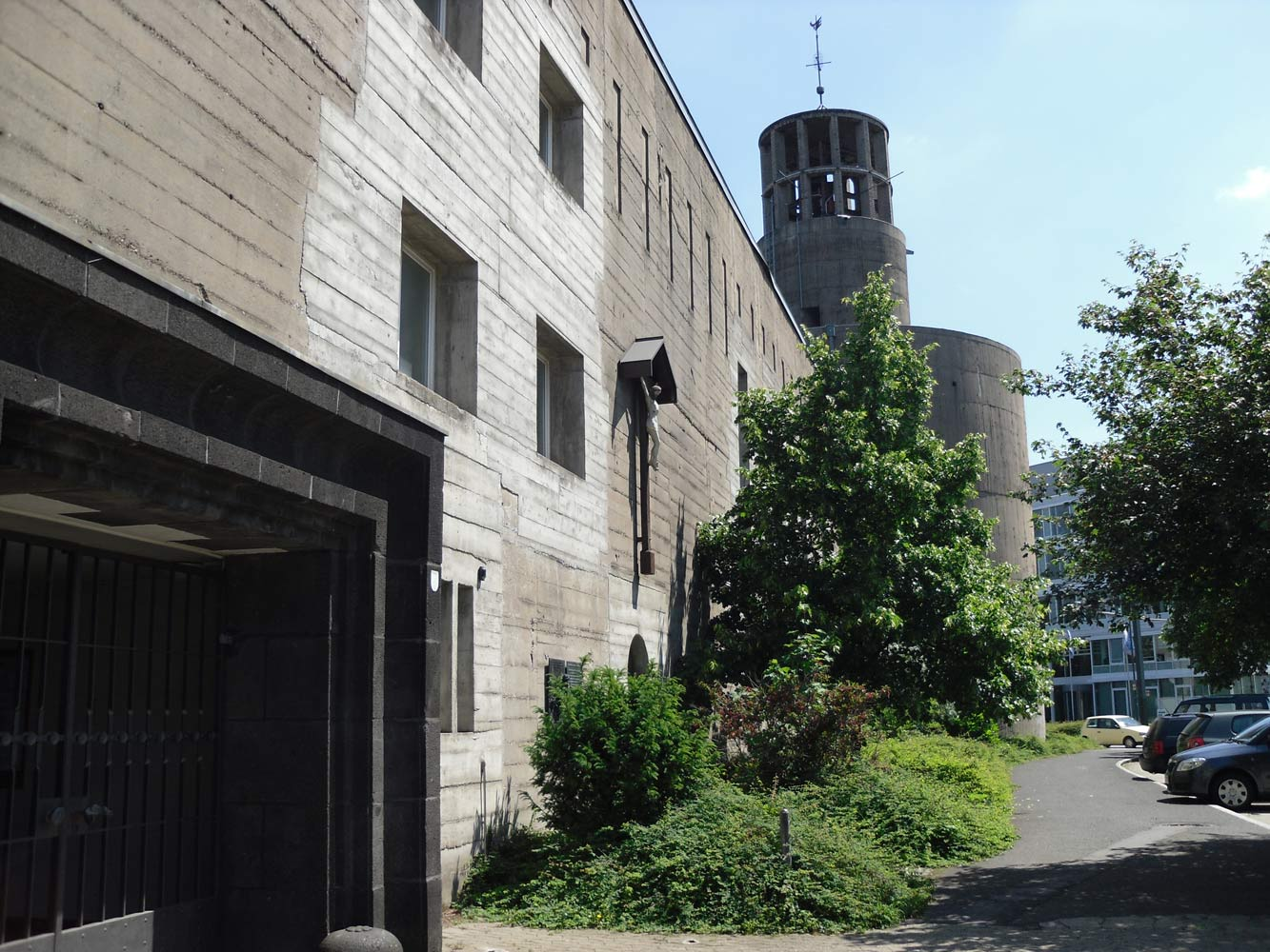 Kirche St. Sakrament, Düsseldorf-Heerdt